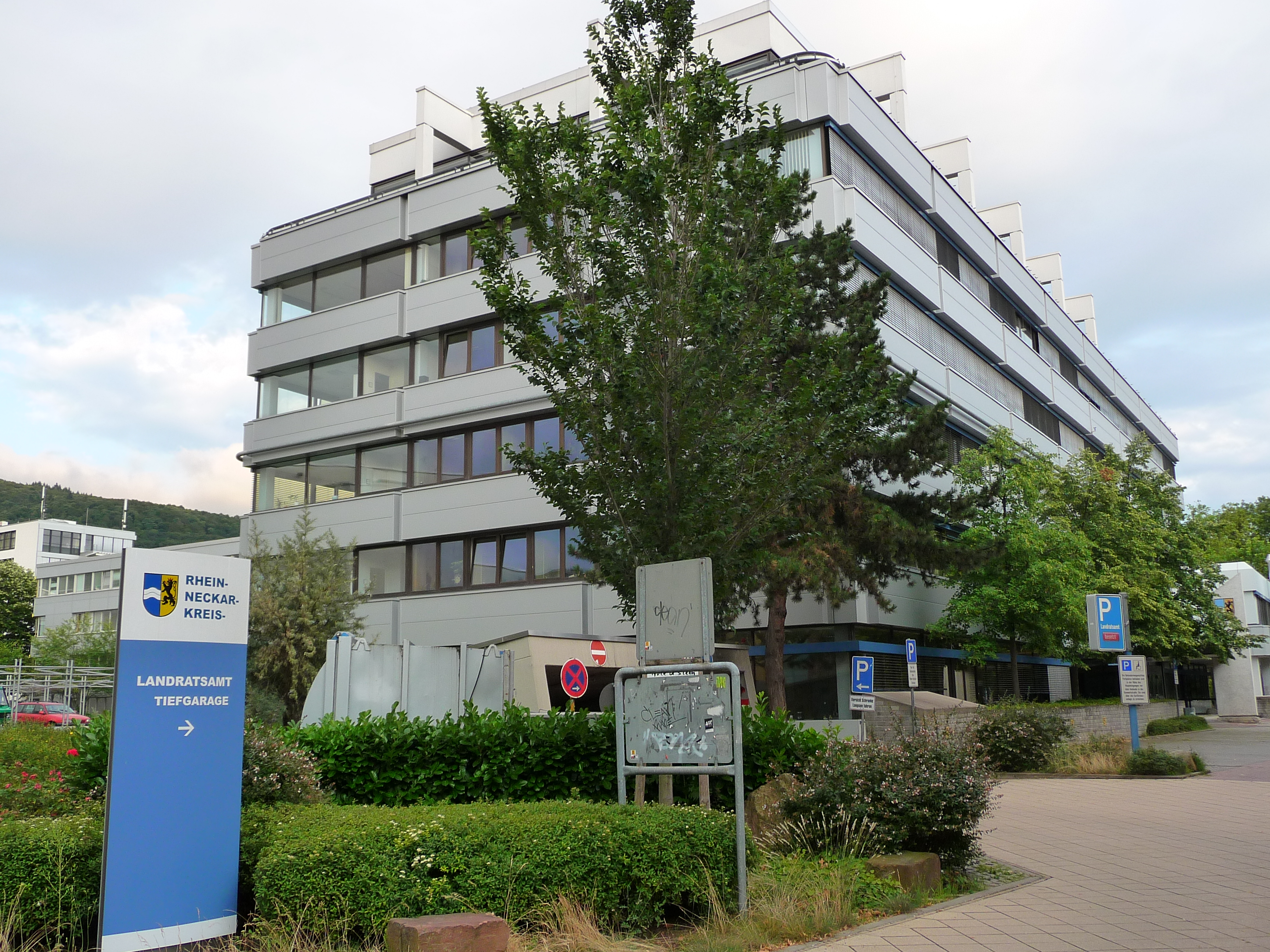 Hauptgebäude des Landratsamtes des Rhein-Neckar-Kreises in Heidelberg (Blick von Nordwesten)